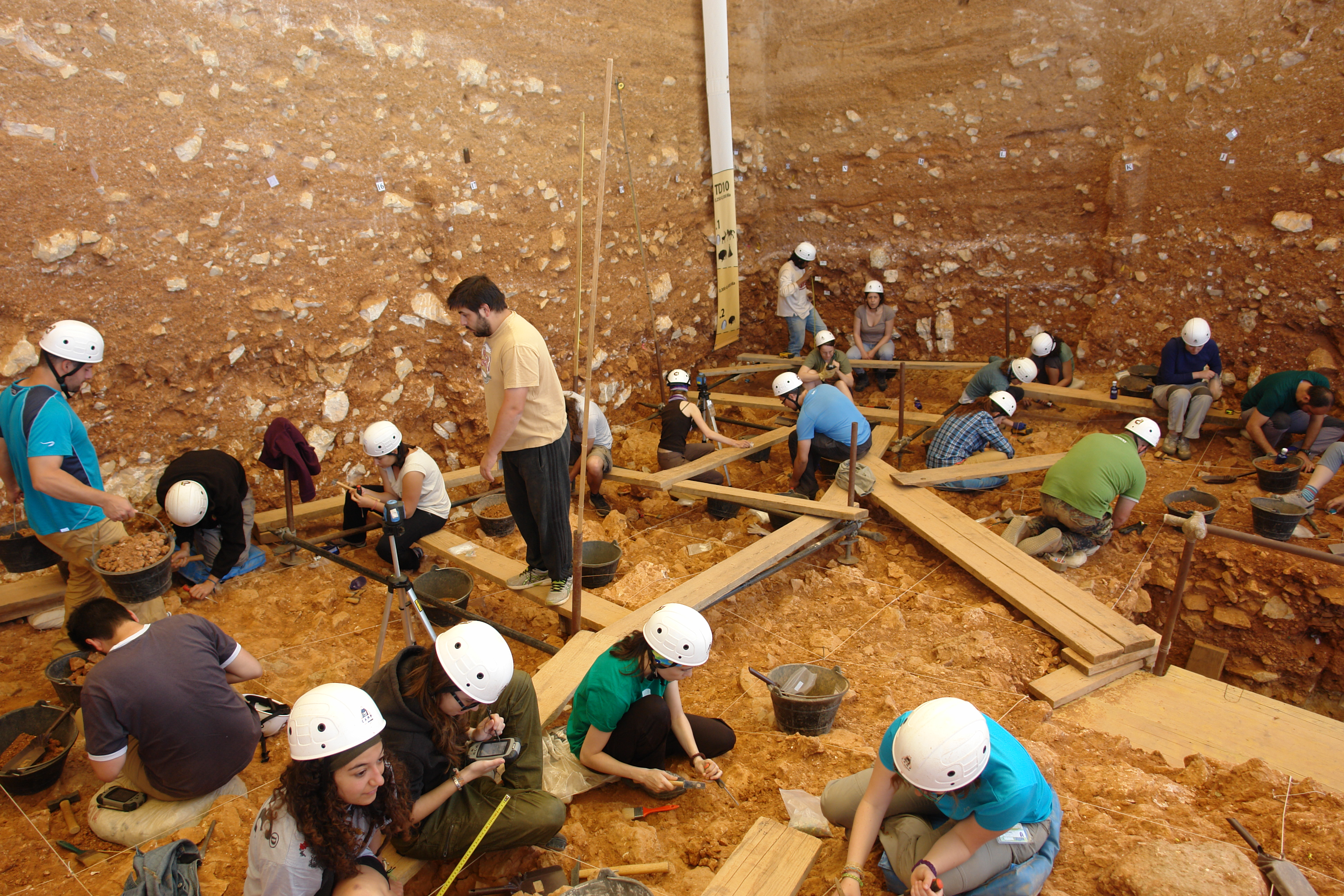 Ossos modificats per carnívors de TD6.3